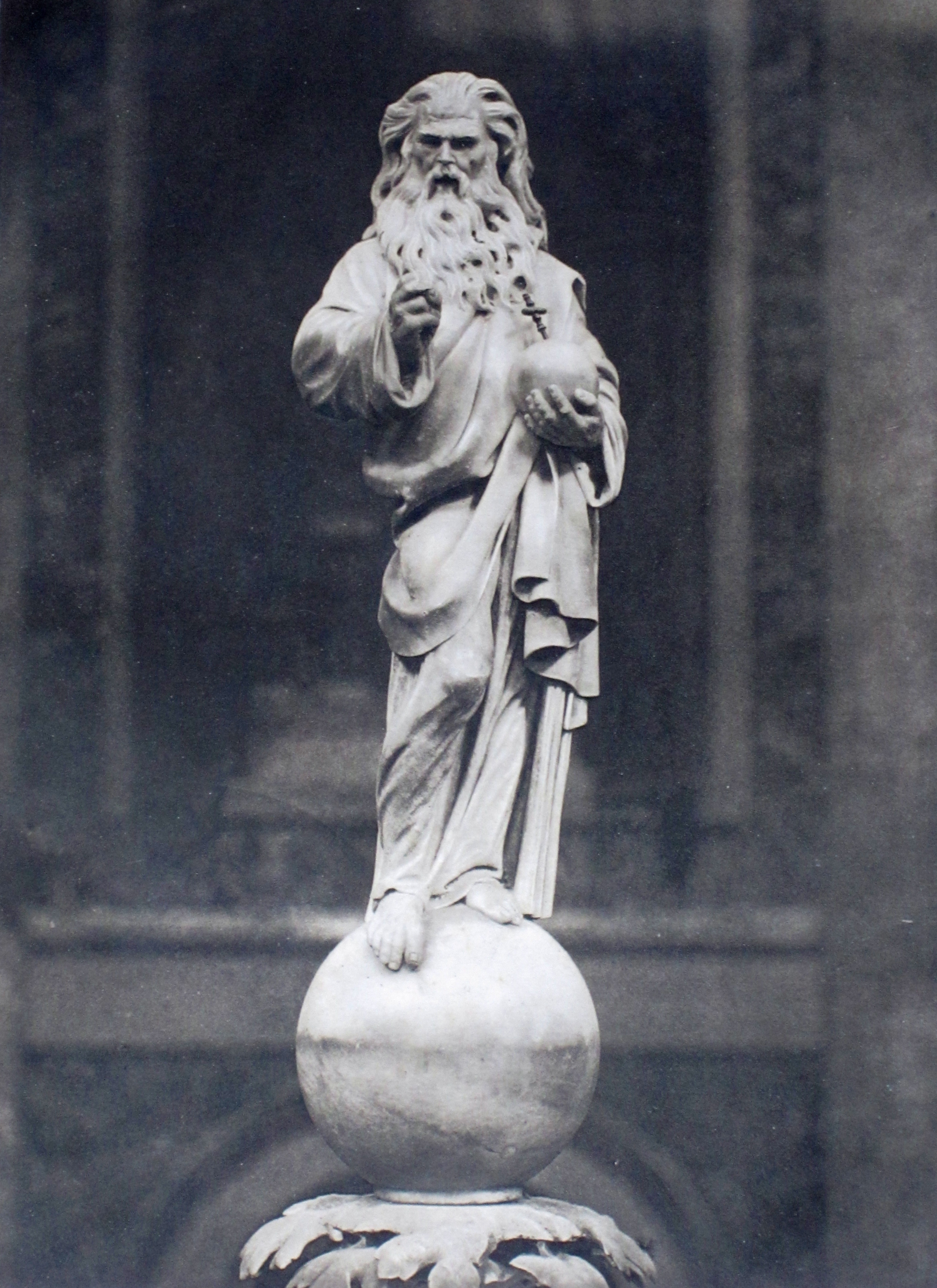 Le Père éternel. Marbre.